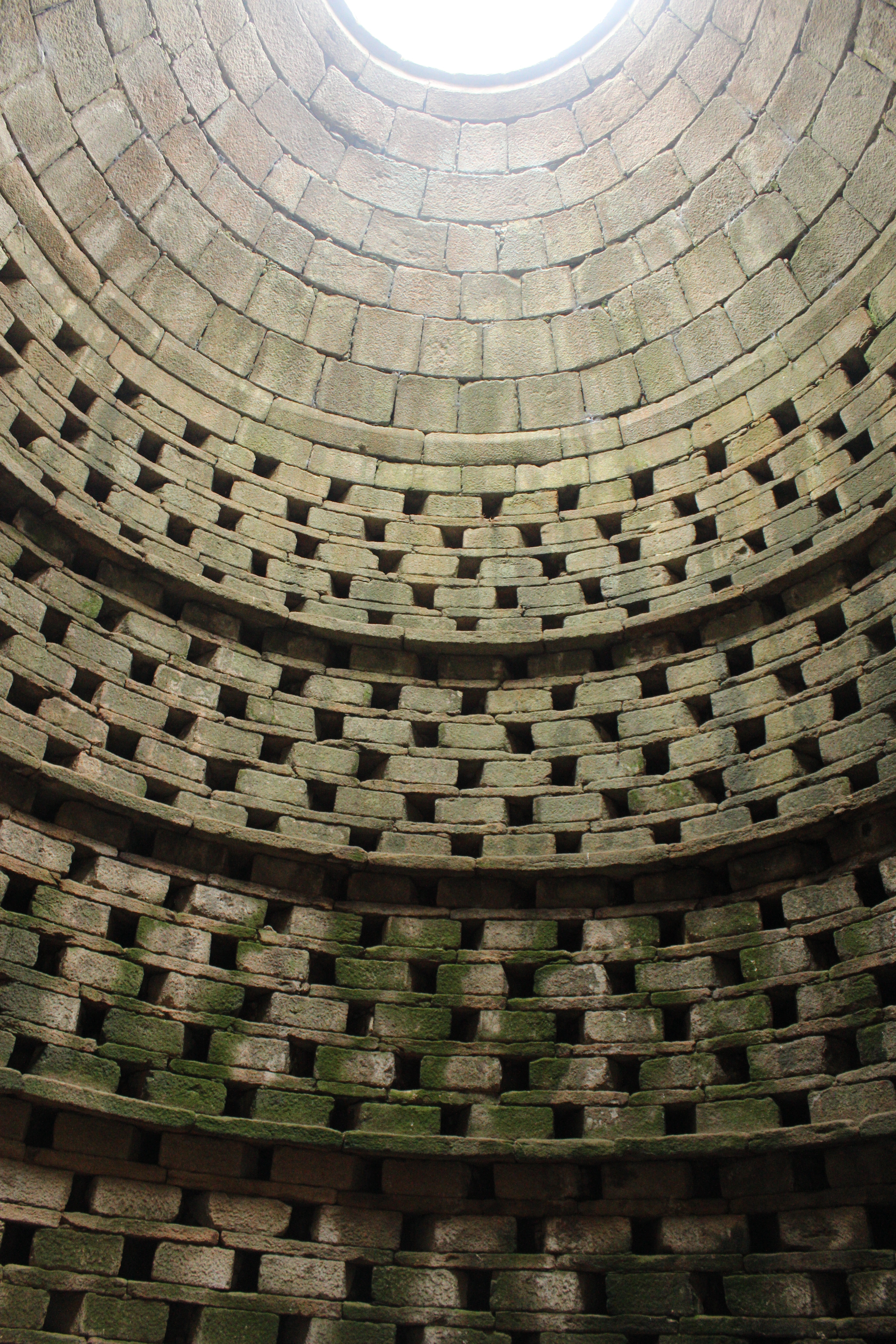 Intérieur du colombier du Château de Kerjean